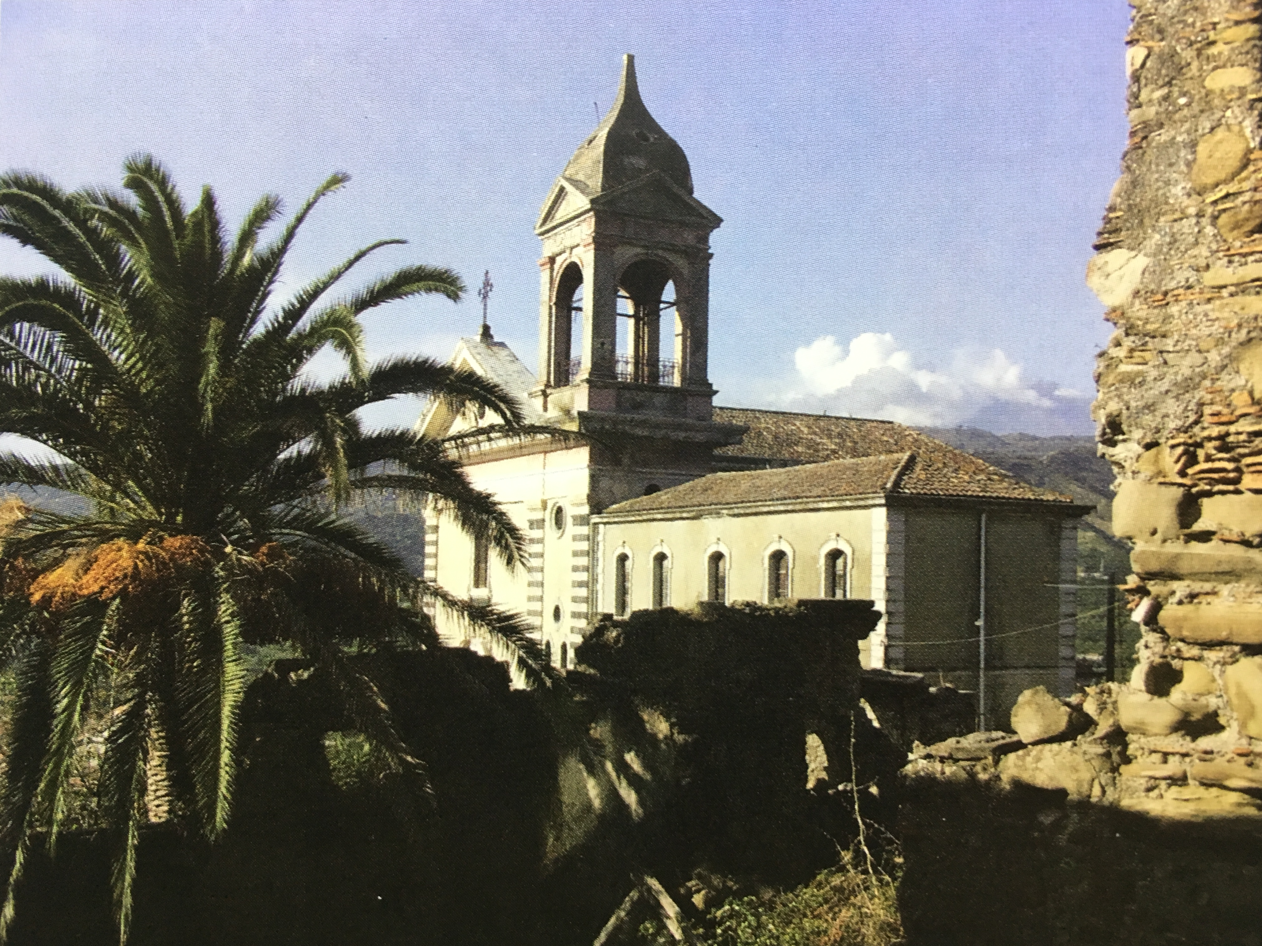 Chiesa Maria S.S. Annunziata, Gaggi, la sua edificazione fu voluta da Biagio de Spucches Corvaja